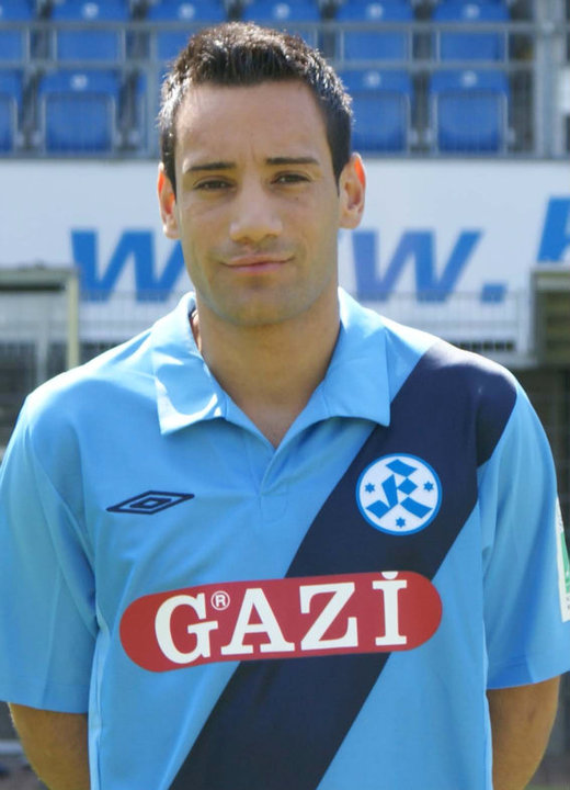 Mahir Savranlıoğlu im Trikot der Stuttgarter Kickers